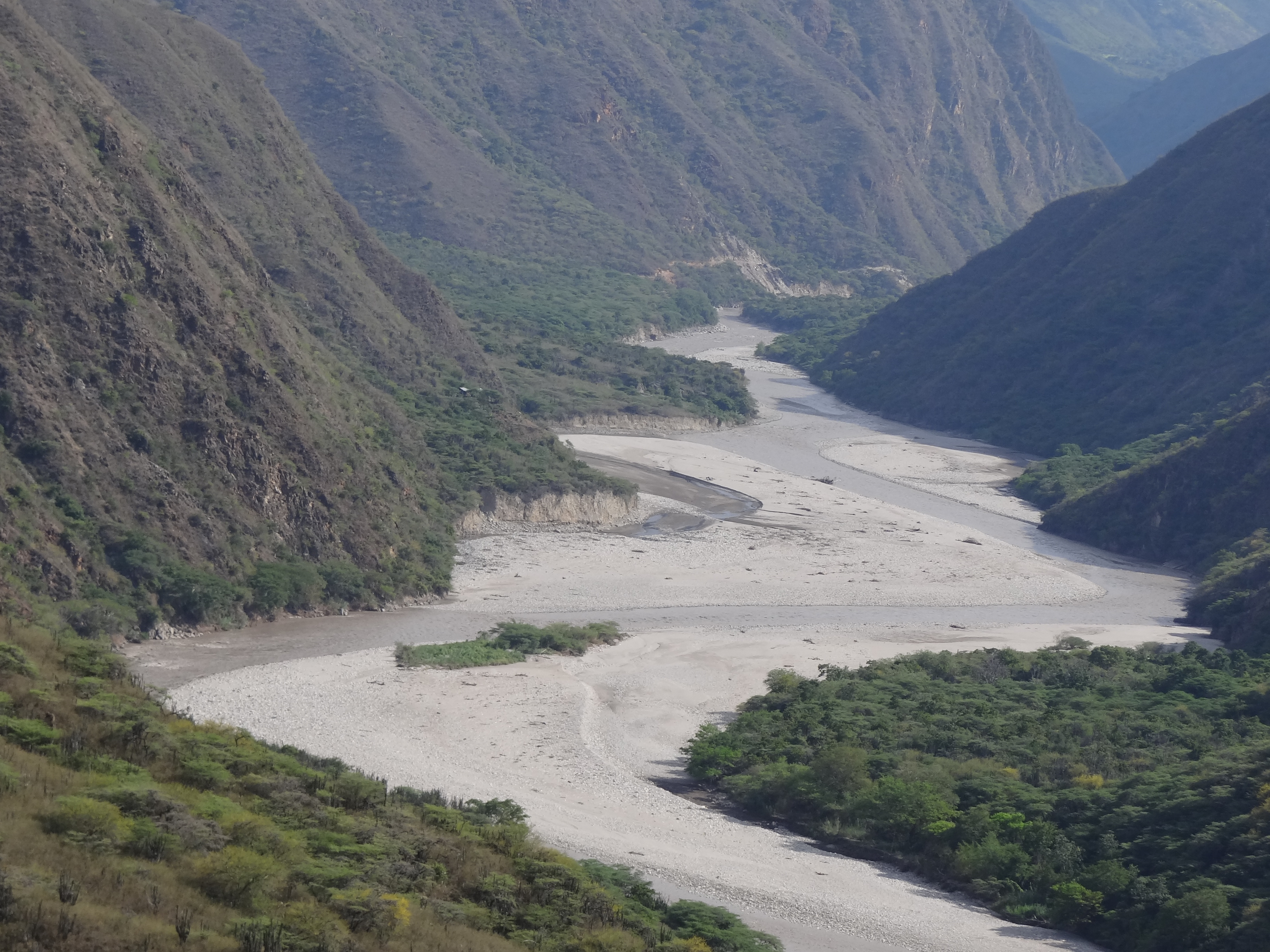 Cañón del Chicamocha en inmediaciones al Parque Nacional del Chicamocha